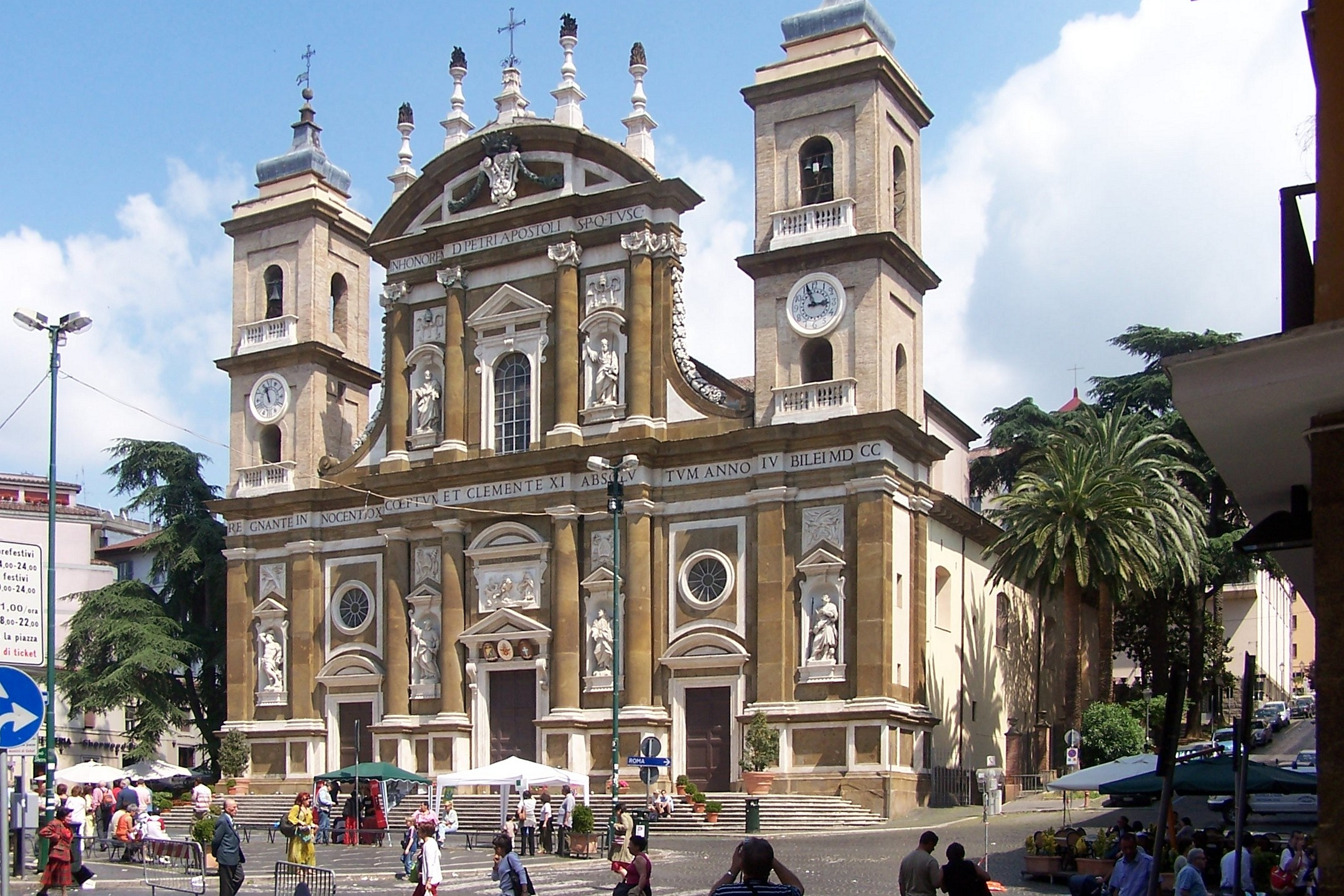 Kirche San Pietro Apostolo in Frascati